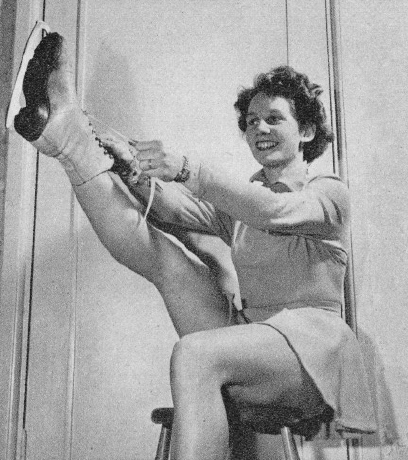 Mona-Lisa Englund